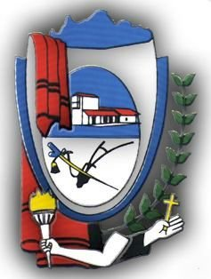 Escudo de la Ciudad de San José de Metán